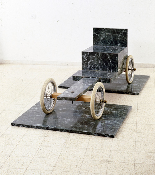 Sculpture